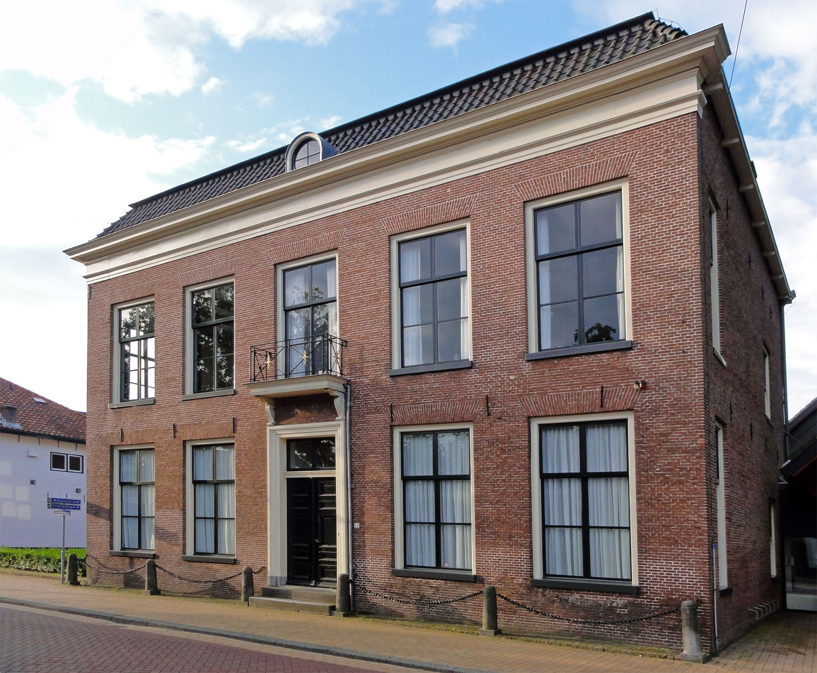 Hoofdstraat 84 Beetsterzwaag